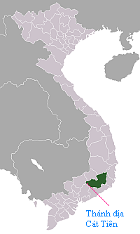 Vị trí thánh địa Cát Tiên. Location of Cat Tien Holy land